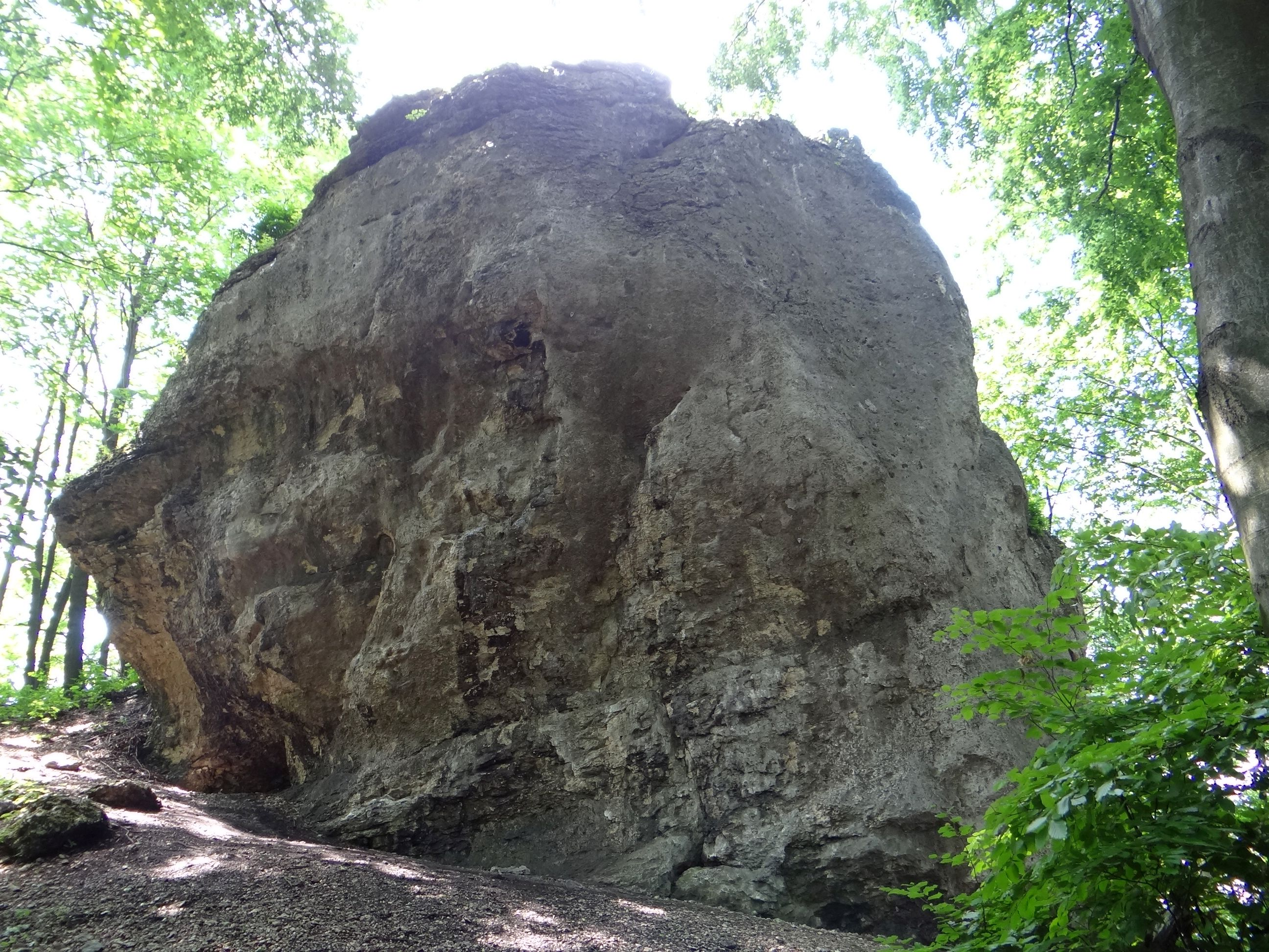 Skała Krzewiny w Bzowie